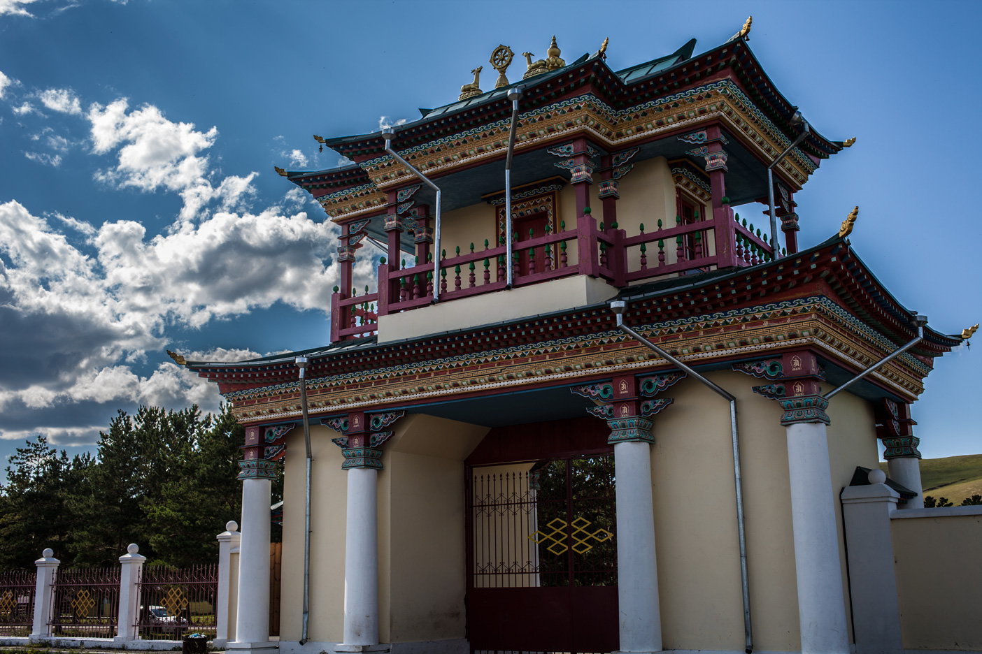 Комплекс дацан Агинский (Забайкальский край, Чита, 7 км от поселка)